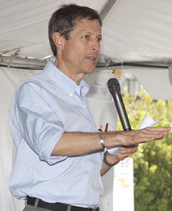 ד"ר ניל ברנרד